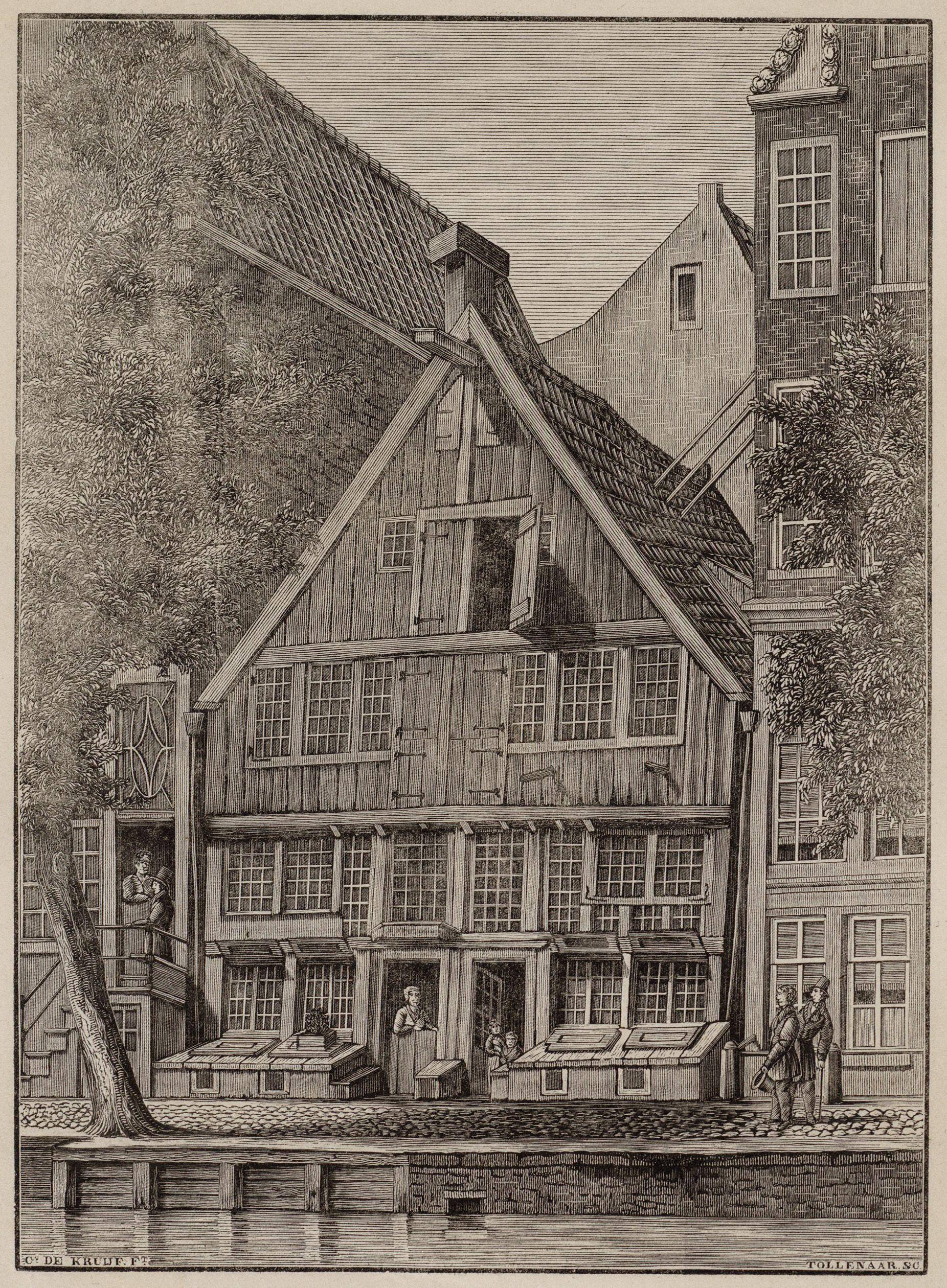 Beschrijving Het woonhuis van Vondel, Spuistraat 188, voorheen de Nieuwezijds Achterburgwal. Techniek: houtsnede Spuistraat 188, voorheen de Nieuwezijds Achterburgwal, het woonhuis van Vondel. Techniek: houtsnede. Documenttype prent Vervaardiger Tollenaar Wz., Dirk Wijbrand (1808-1858) Kruyff, Cornelis de Collectie Collectie Stadsarchief Amsterdam: tekeningen en prenten Datering 1800 ca. t/m 1850 ca. Inventarissen Afbeeldingsbestand 010097006241 Generated with Dememorixer